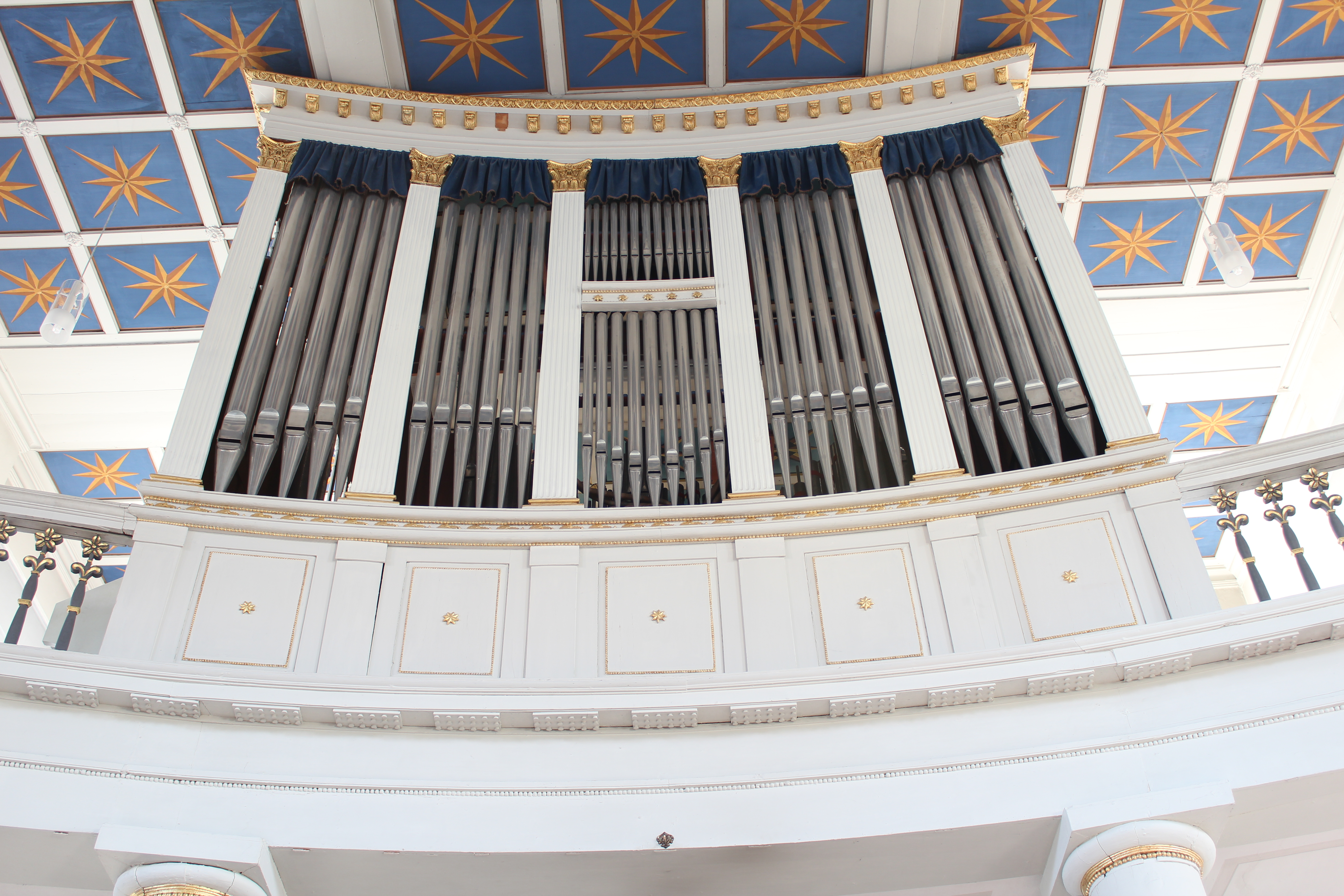 Orgel der Evangelischen Kirche Wißmar, Gemeinde Wettenberg, Landkreis Gießen, Hessen, Deutschland